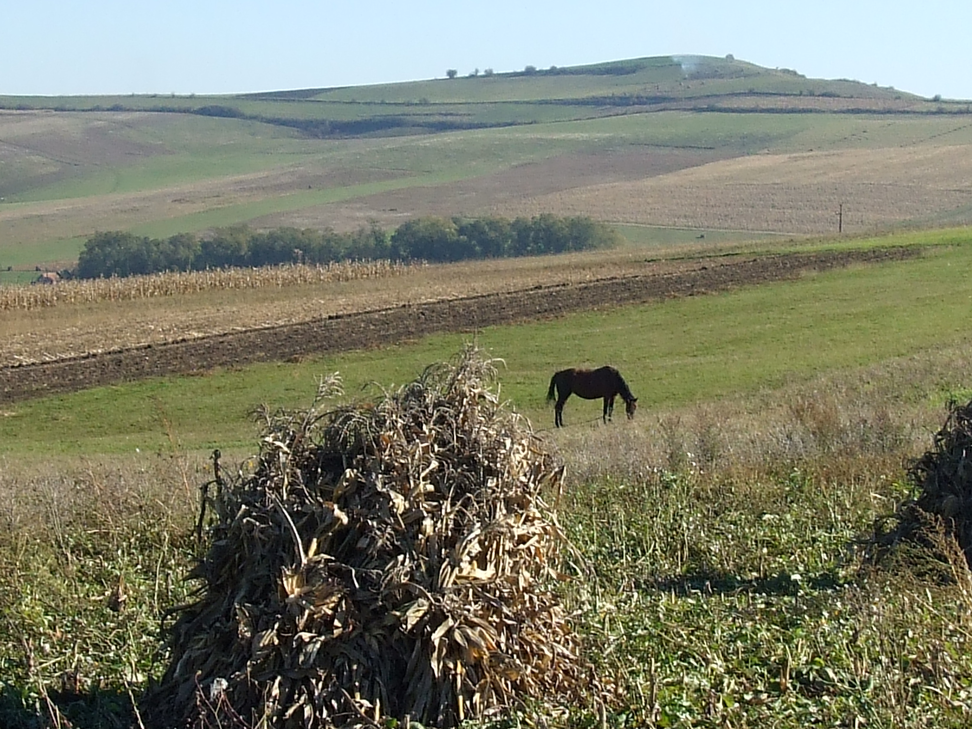 imagini din Aruncuta,jud.Cuj